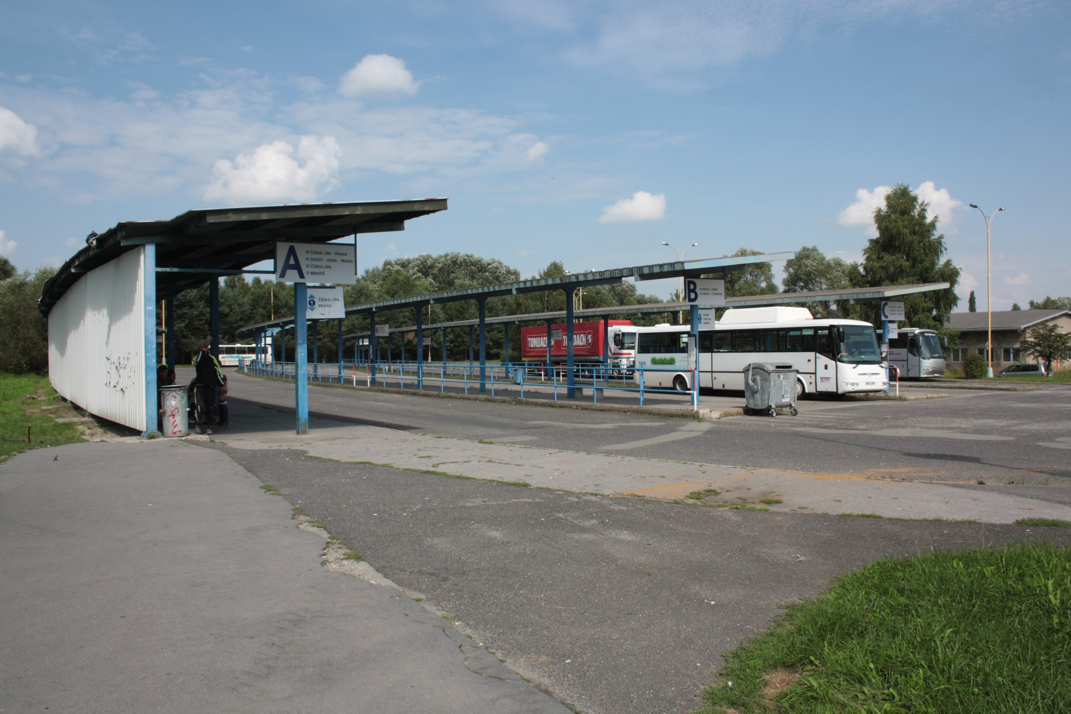 Stráž pod Ralskem, autobusové nádraží